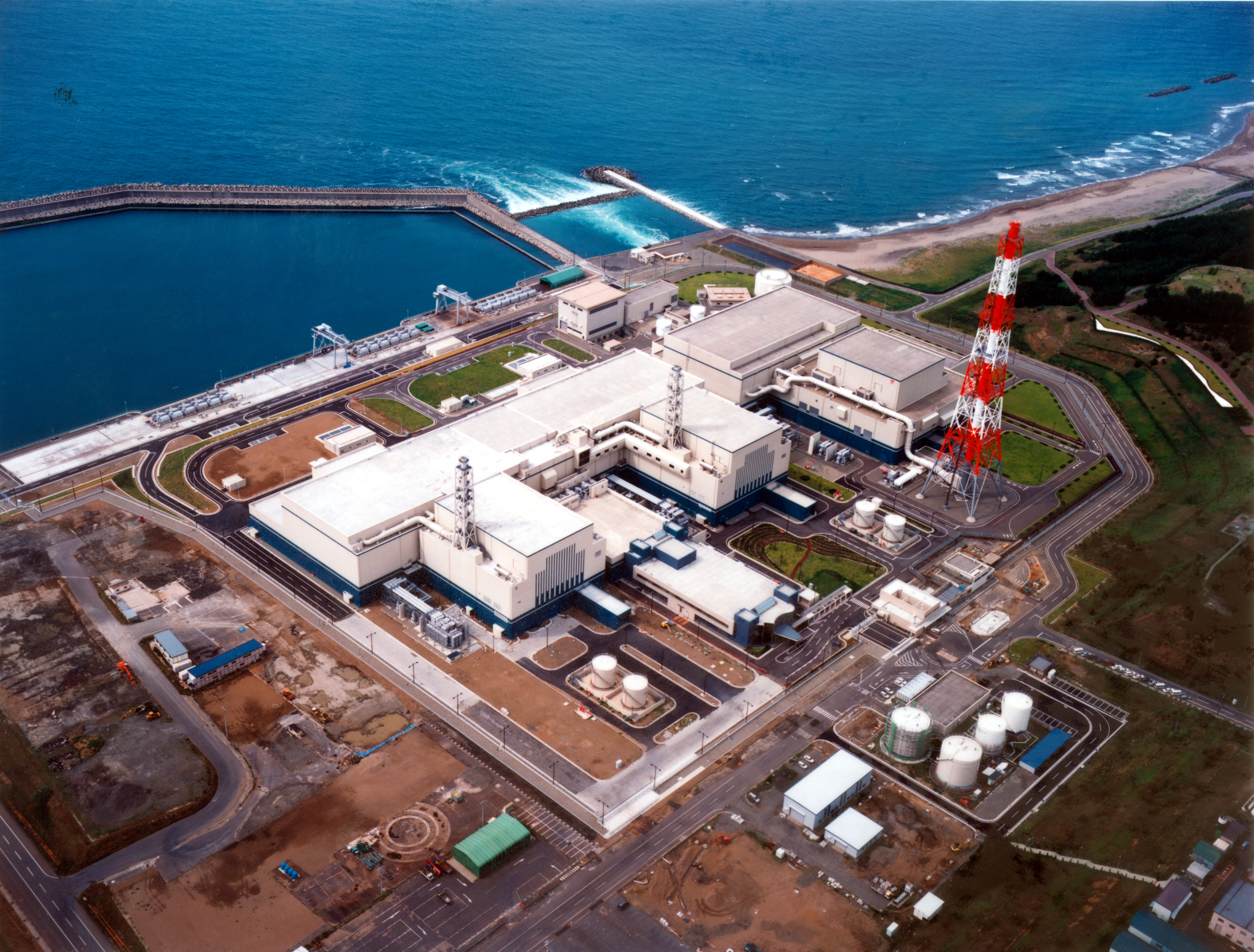 Kashiwazaki-Kariwa Nuclear Power Station, ABWR. (Kashiwazaki-Kariwa, Japan) Photo Credit: Tokyo Electric Power Co., TEPCO